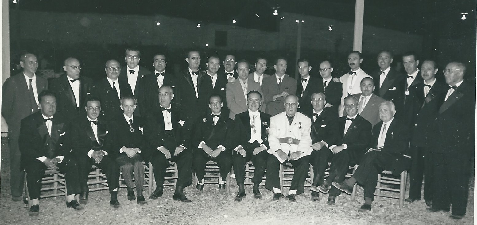 Festa de la poesia. Sagunt 27 de juliol de 1957.En la primera fila, primer de la dreta Ricard Sanmartín. Tercer de l'esquerra Maximilià Thous.